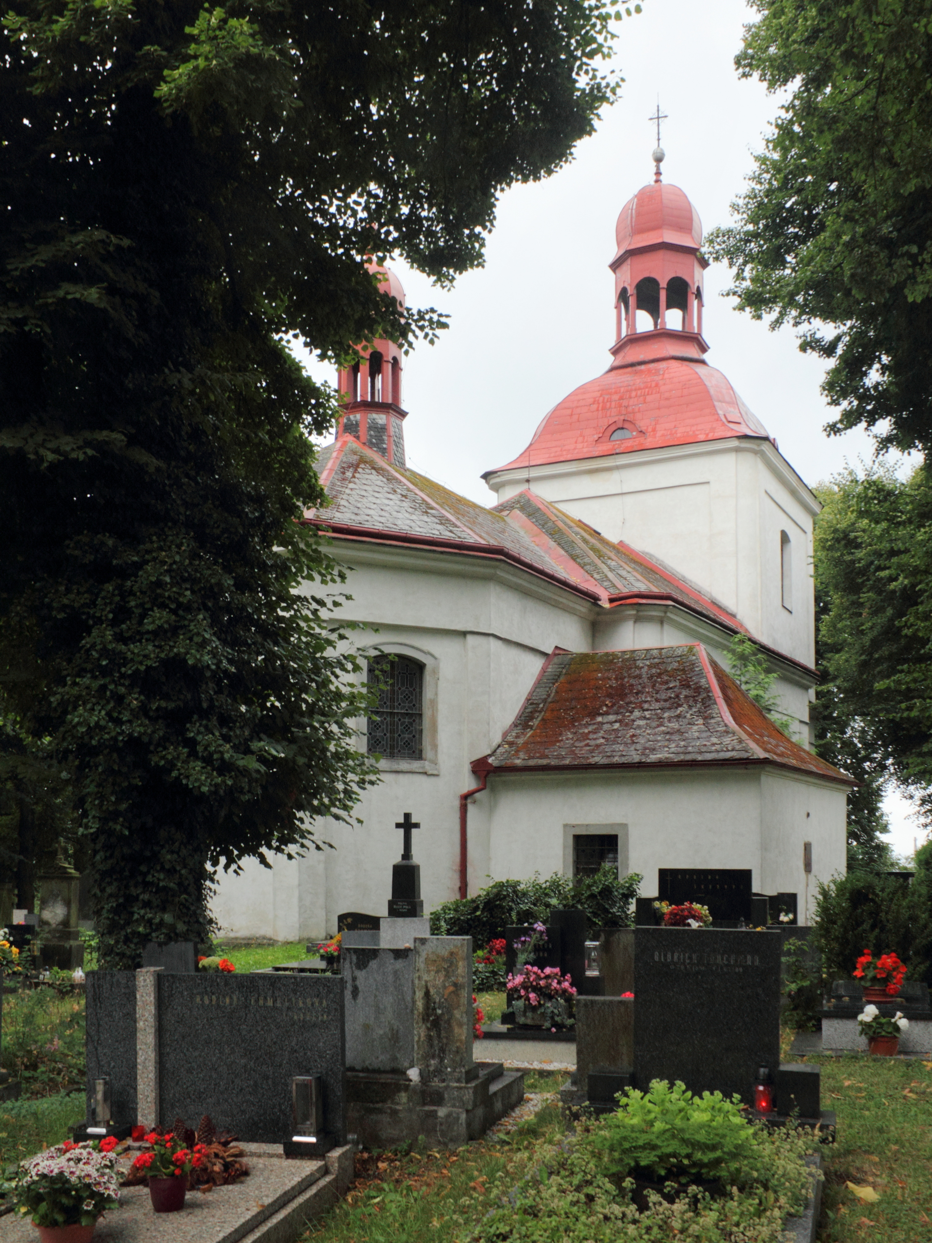 Kostel svatého Matěje, na Hruštici, parc. 1223, Turnov